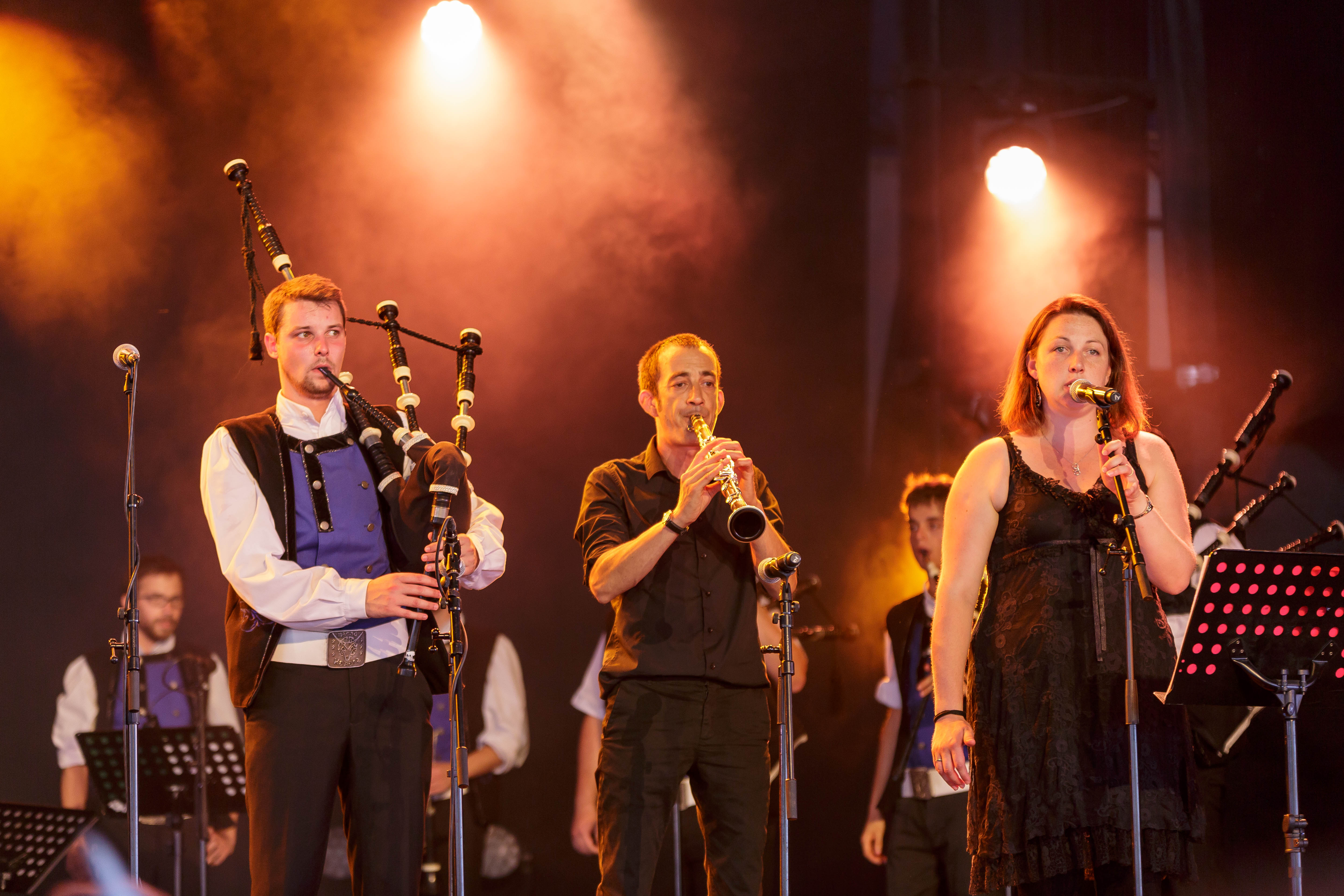 Paléo Festival Nyon, édition 2016, 19-24 juillet 2016. Dimanche 24: Bagad Karaez (folk breton, France)